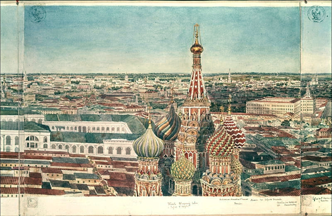 Панорама Москвы 20-ых годов XIX века